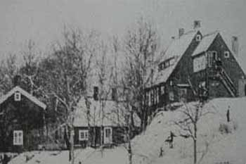 Skeviks gård på Värmdö.